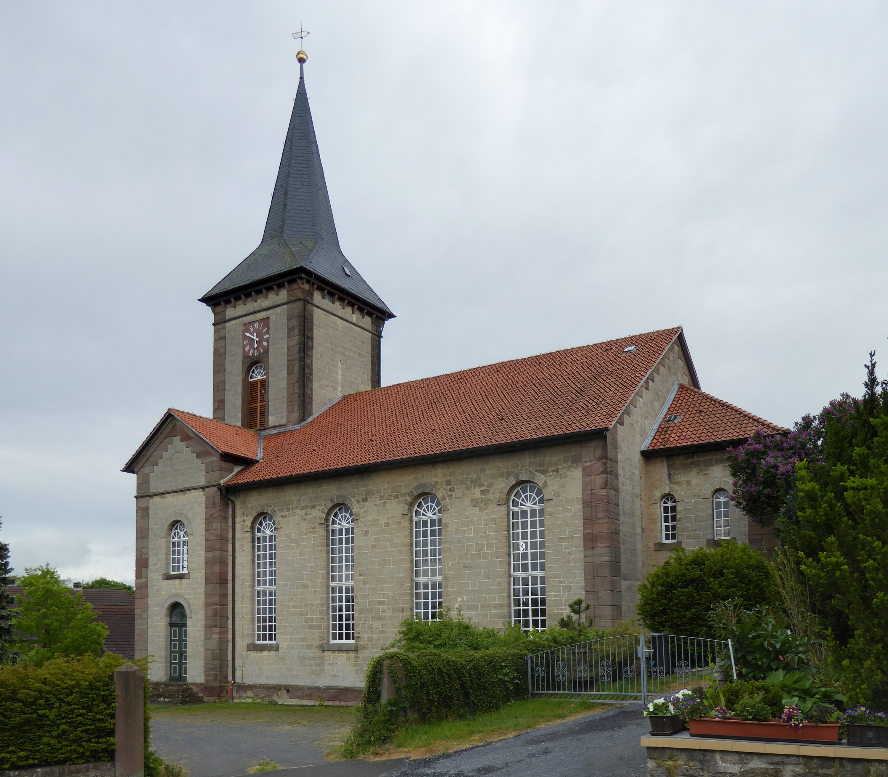 Ev.-luth. Kirche in Lutterhausen, Stadt Hardegsen, Südniedersachsen. Erbaut 1852-55 nach 1848 erstellten Plänen des hannoverschen Konsistorialbaumeisters Ludwig Hellner. Eingeweiht 1859 nach Fertigstellung des Innenausbaus